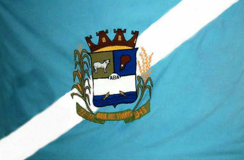 Divulgamos e contamos há historia de Abadia dos Dourados por amor há esse povo, há nossa senhora de Abadia, temos vários site que todos podem ver melhor nosso trabalho. Orkut. Abadia dos Dourados – Minha Paixão Panorâmio. Site Minas: Site Brasil: Léo / MPB / Gustavo